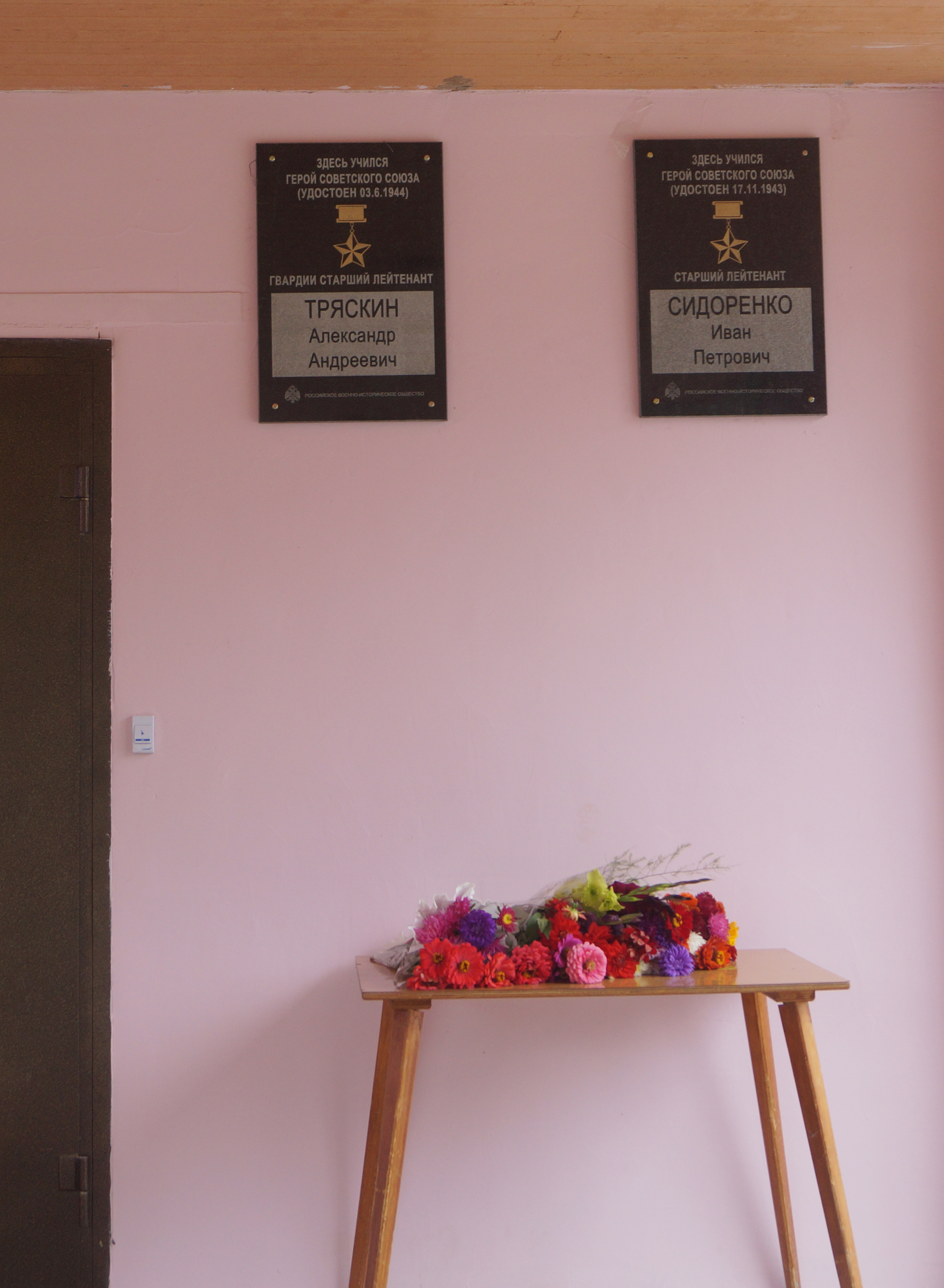 Новослободская школа - плиты в честь Героев